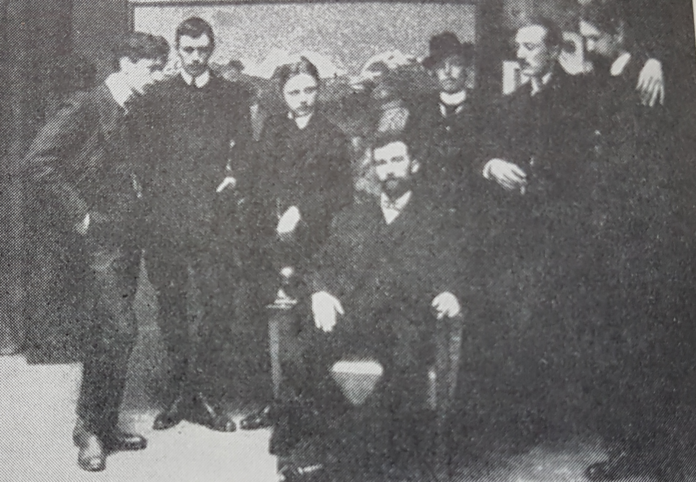 En gruppbild från De ungas utställning 1909. Från vänster Ivar Johnsson, Gabriel Burmeister, Ture Ander, Birger Simonsson, Arvid Nilsson, Sigfrid Ullman och Knut Janson. , avfotograferad bild från Allhems Svenskt konstnärslexikon.